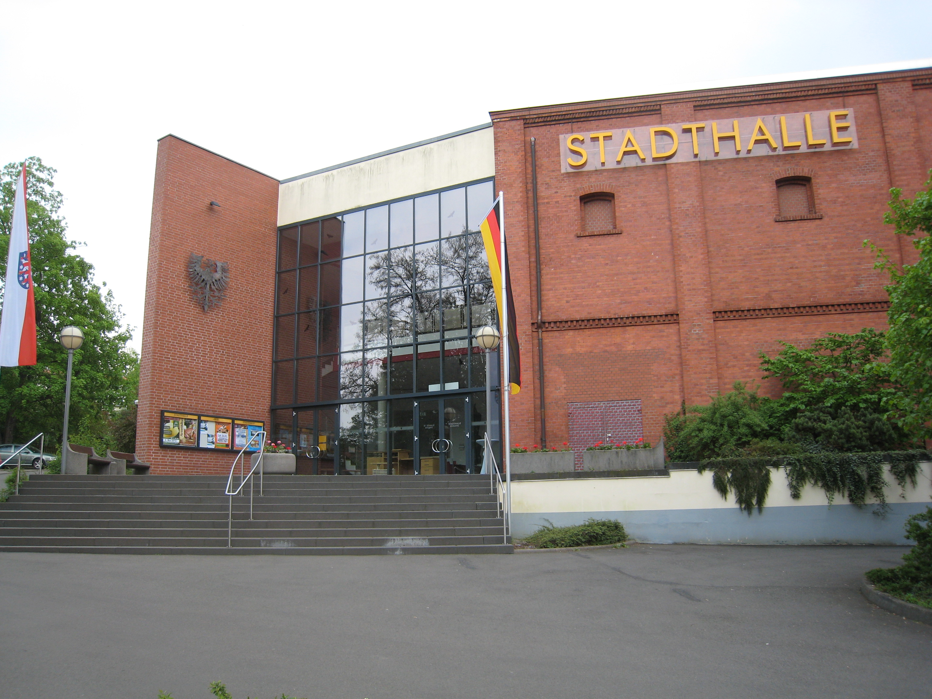 Stadthalle in Arnstadt